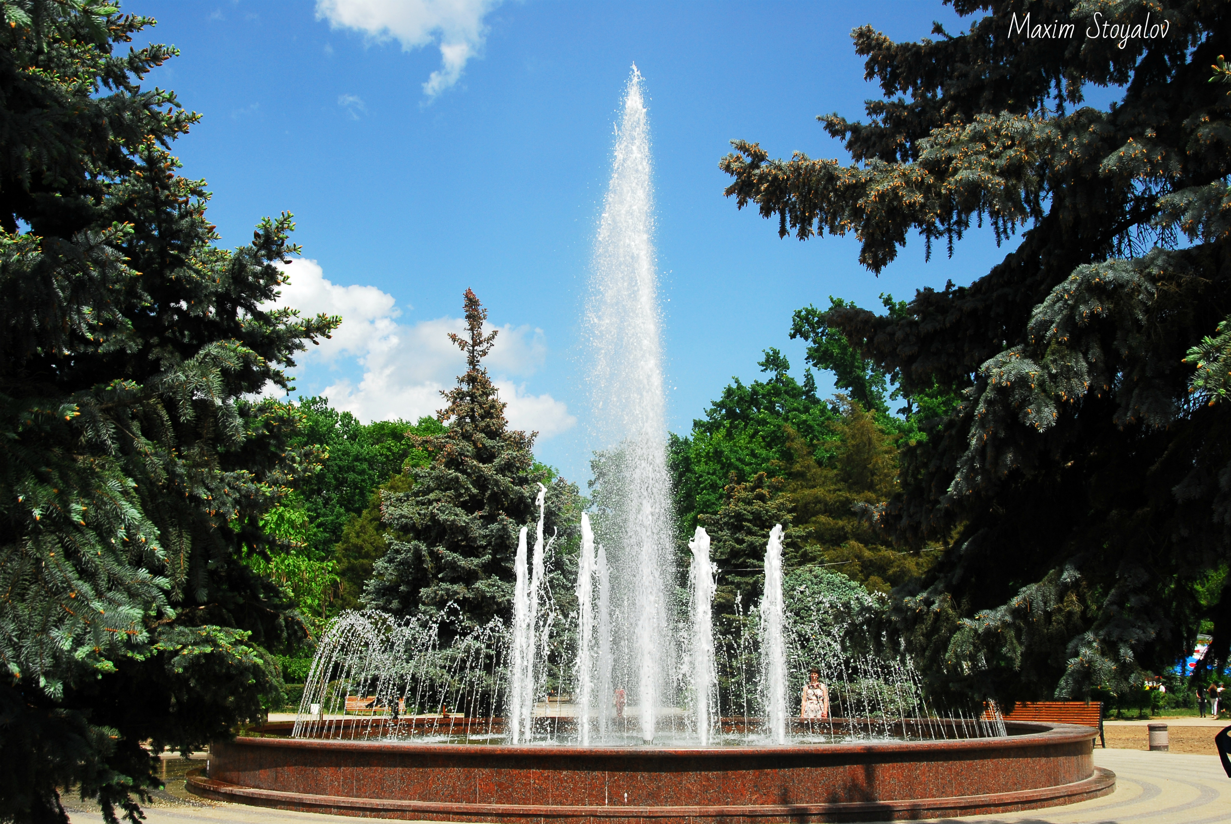 Мелитополь